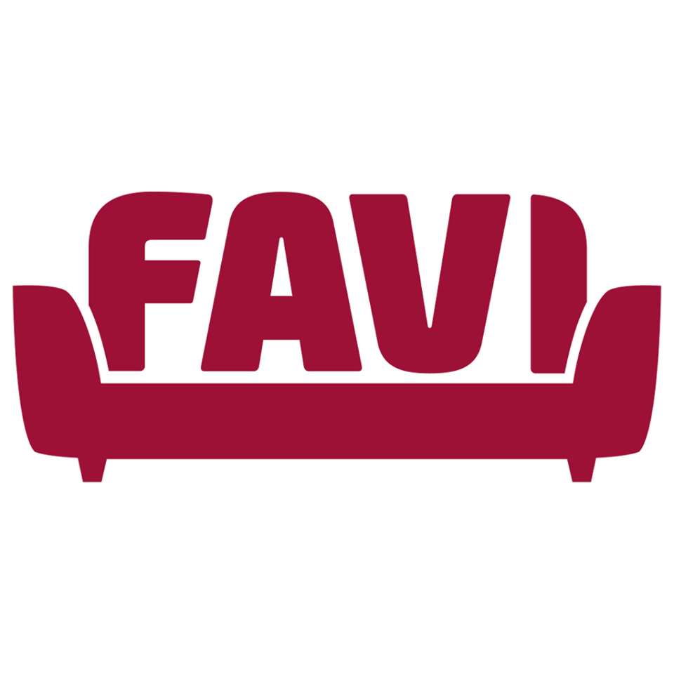 Logo internetového vyhledávače nábytku a bytových FAVI